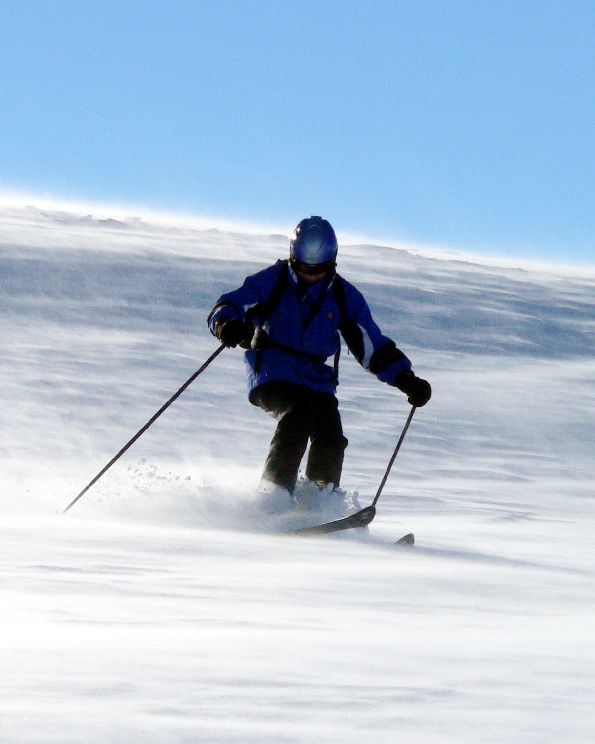 Skiläufer, selbst fotografiert